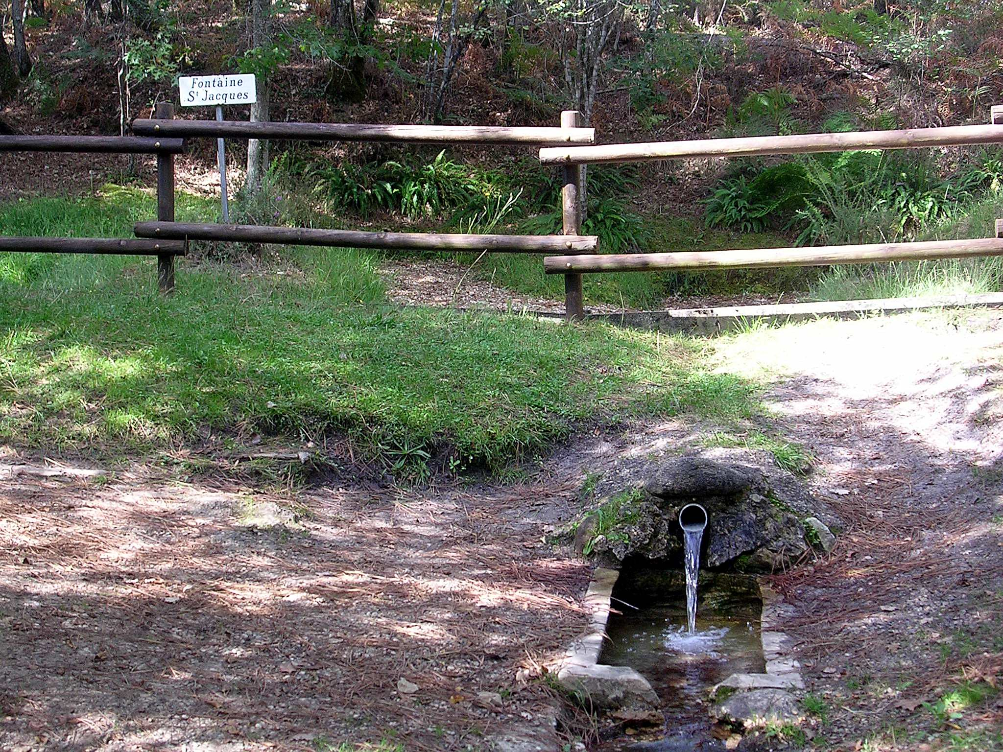 Saint-Yaguen